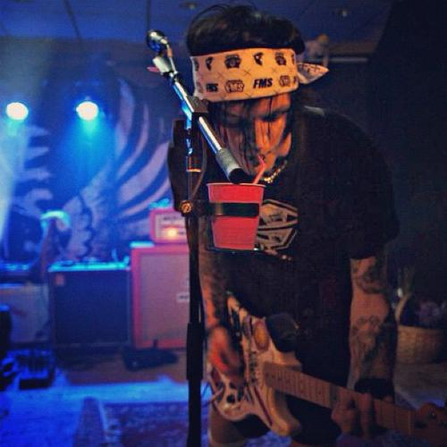 Future Idiots på sin releasefest för albumet 'Future Idiots i Klippan 2012.